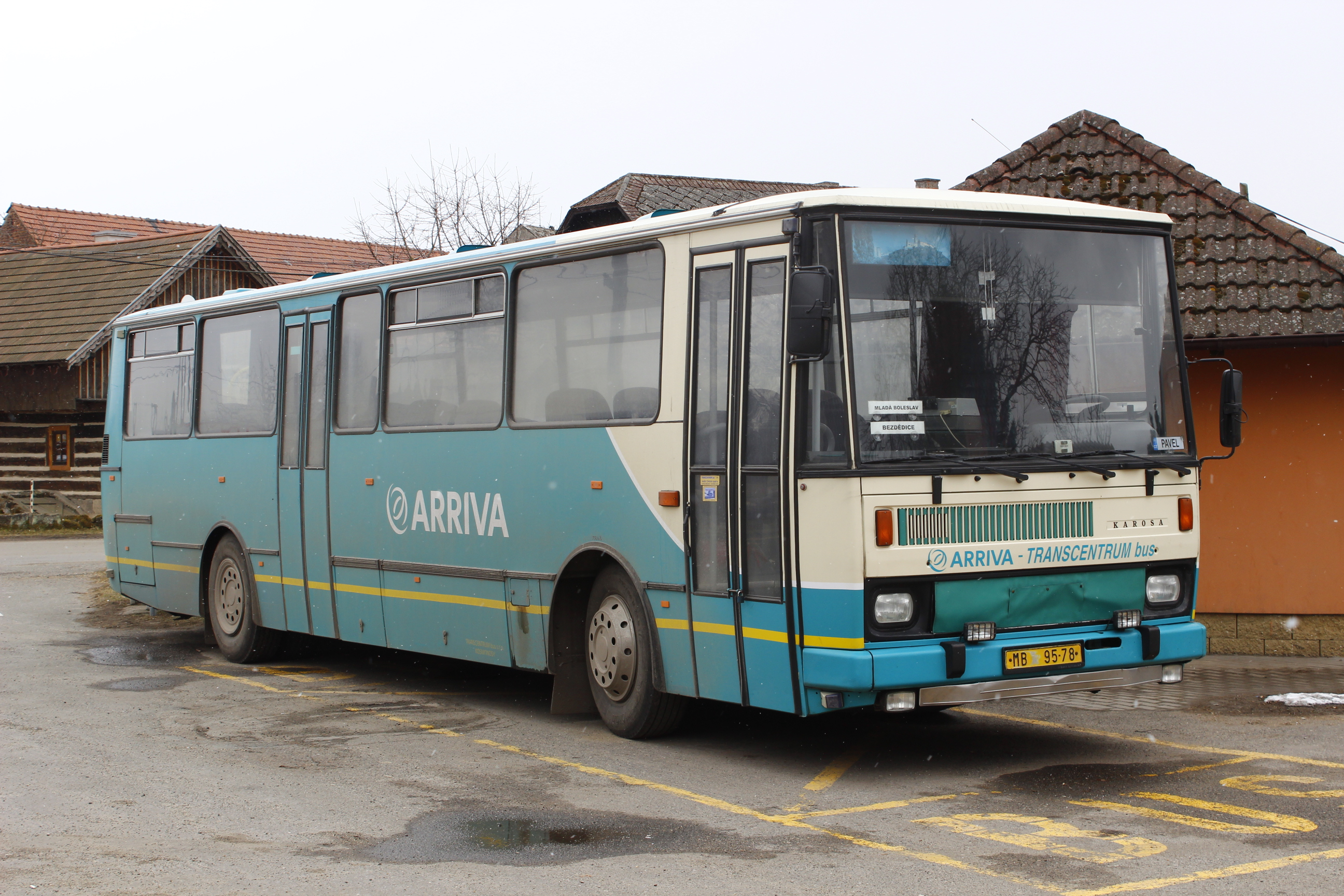 Autobus Karosa v Březovicích na Mladoboleslavsku.